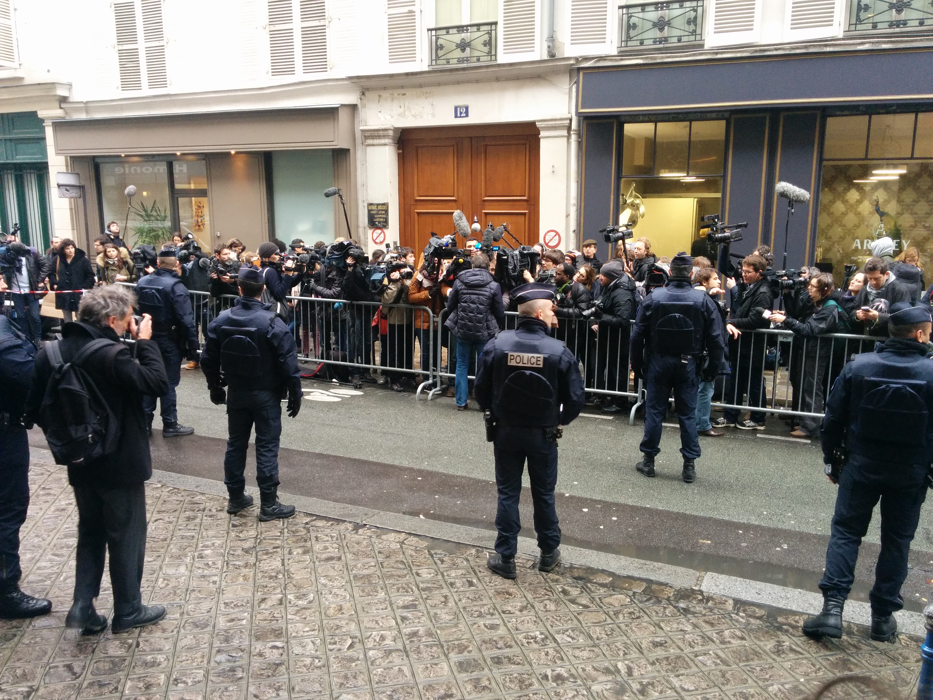 Des journalistes attendent l'arrivée de la rédaction de Charlie Hebdo dans les locaux du journal Libération, le 9 janvier 2015.